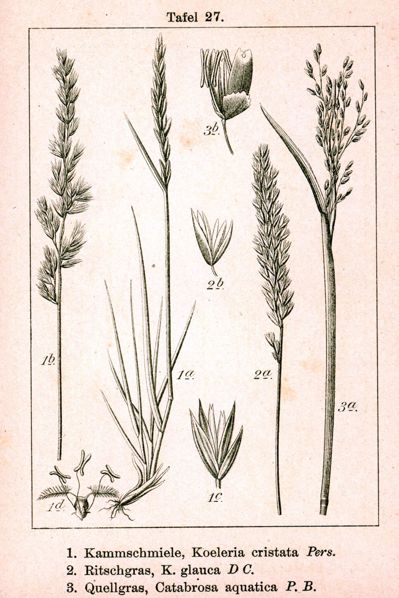 1. Koeleria pyramidata (Lam.) P.Beauv., syn. Koeleria cristata Pers., nom. ill. 2. Koeleria glauca (Spreng.) DC. 3. Catabrosa aquatica (L.) P.Beauv. Original Description 1. Kammschmiele, Koeleria cristata Pers. 2. Ritschgras, K. glauca DC. 3. Quellgras, Catabrosa aquatica P. B.